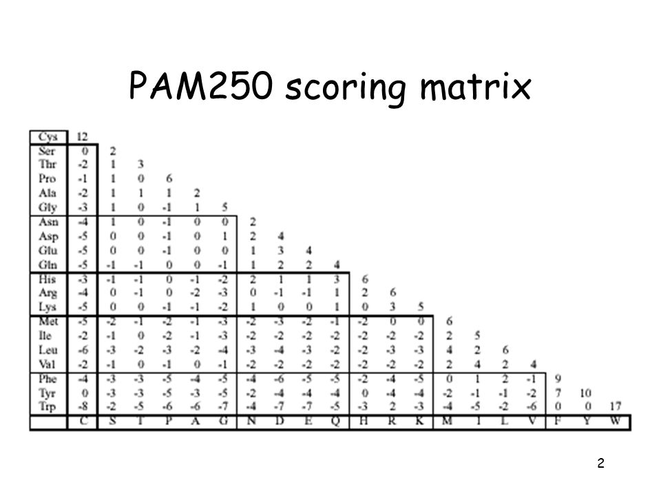 point accepted mutation matrix example PAM 250 scoring matrix